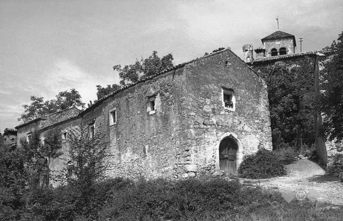 Tabor (Erzelj), hiša z gotskimi okni in vrati, pri Kovačkovih, Erzelj.